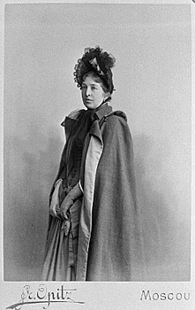 Якунчикова (урожд. Мамонтова) Зинаида Николаевна (1843-1919) Фото Опитца Ф. Москва. 1880-е гг.